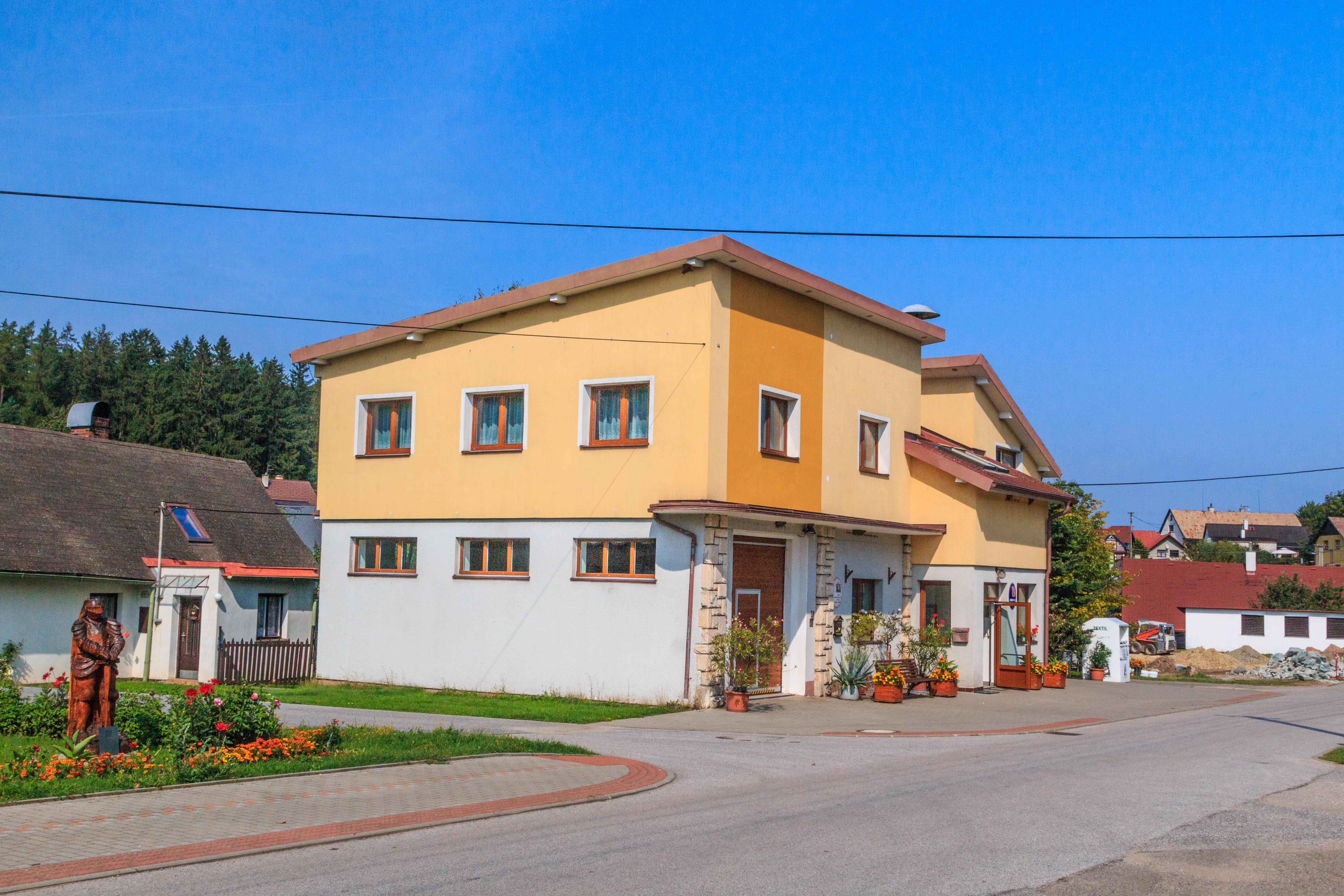 Česká Čermná - obecní úřad